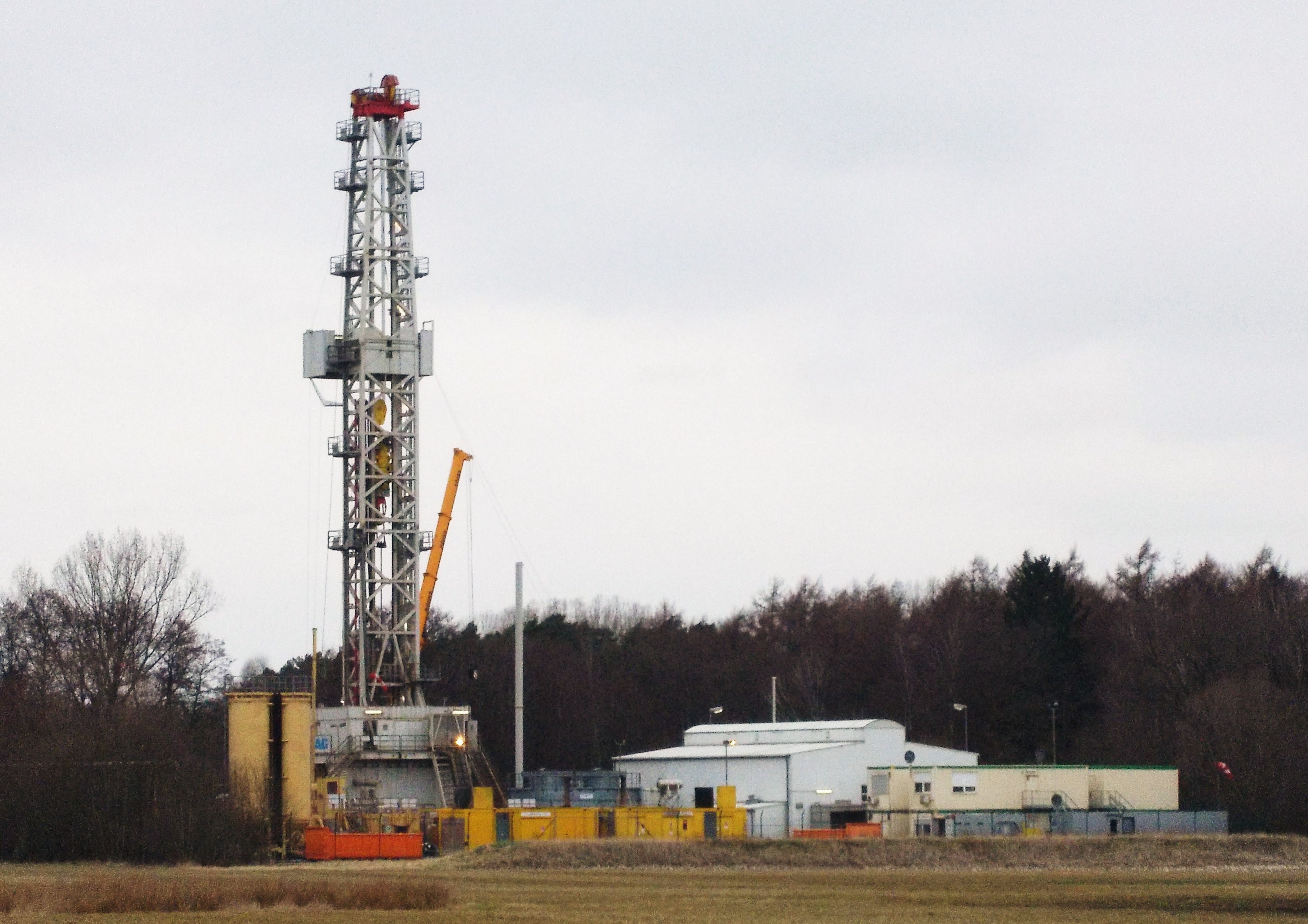 Gasbohrung "Söhlingen Z9", ExxonMobil